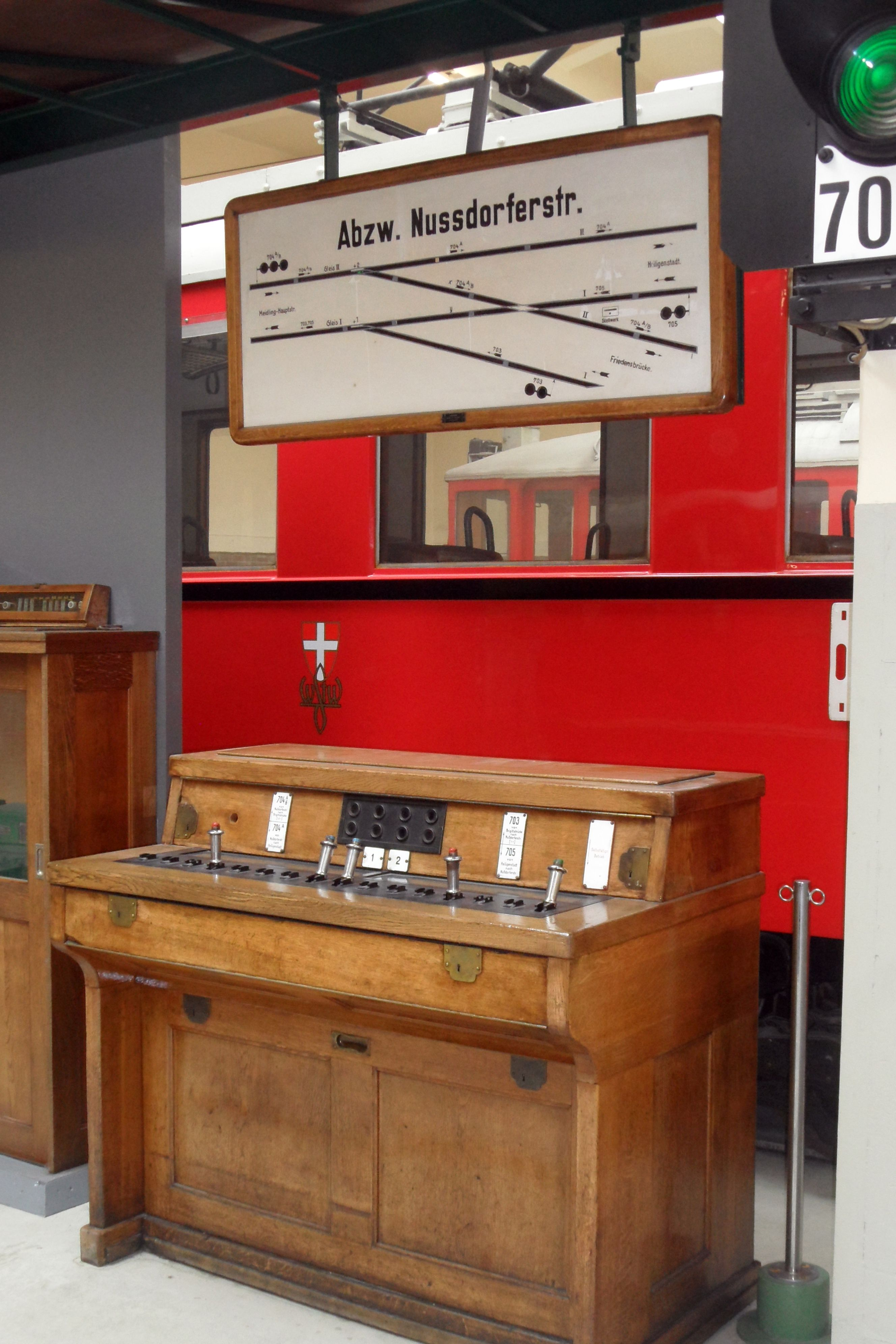 Fahrschautafel und Schalterwerk der ehemaligen Abzweigung Nußdorfer Straße. Diese Kombination war bei Stellwerken von Stadtschnellbanhnen schon in den 1920er Jahren üblich, die Gleisstreifenausleuchtung zeigt die Wirkung der selbsttätigen Gleisfreimeldeanlage.Die Fahrschautafelausleuchtung war entgegengesetzt zur heute üblichen. Sämtliche freie und ungestörte Abschnitte wurden weiß ausgeleuchgtet, belegte und gestörte waren dunkel.